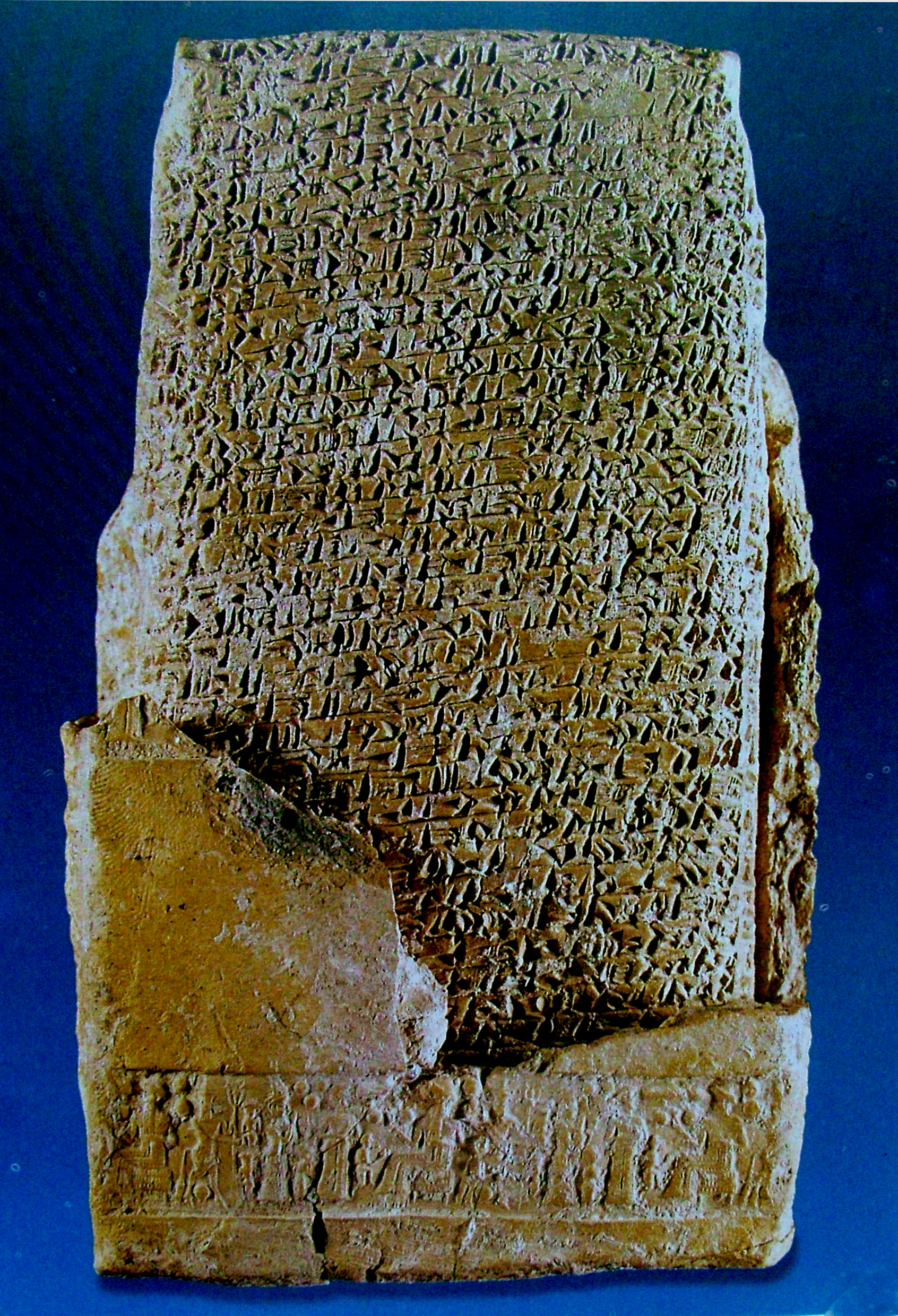 Felbontatlan ékírásos levél és borító Kültepéből, 11,1 cm, – Kr. e. 19. század (Anatóliai Civilizációk Múzeuma, Ankara, Törökország)